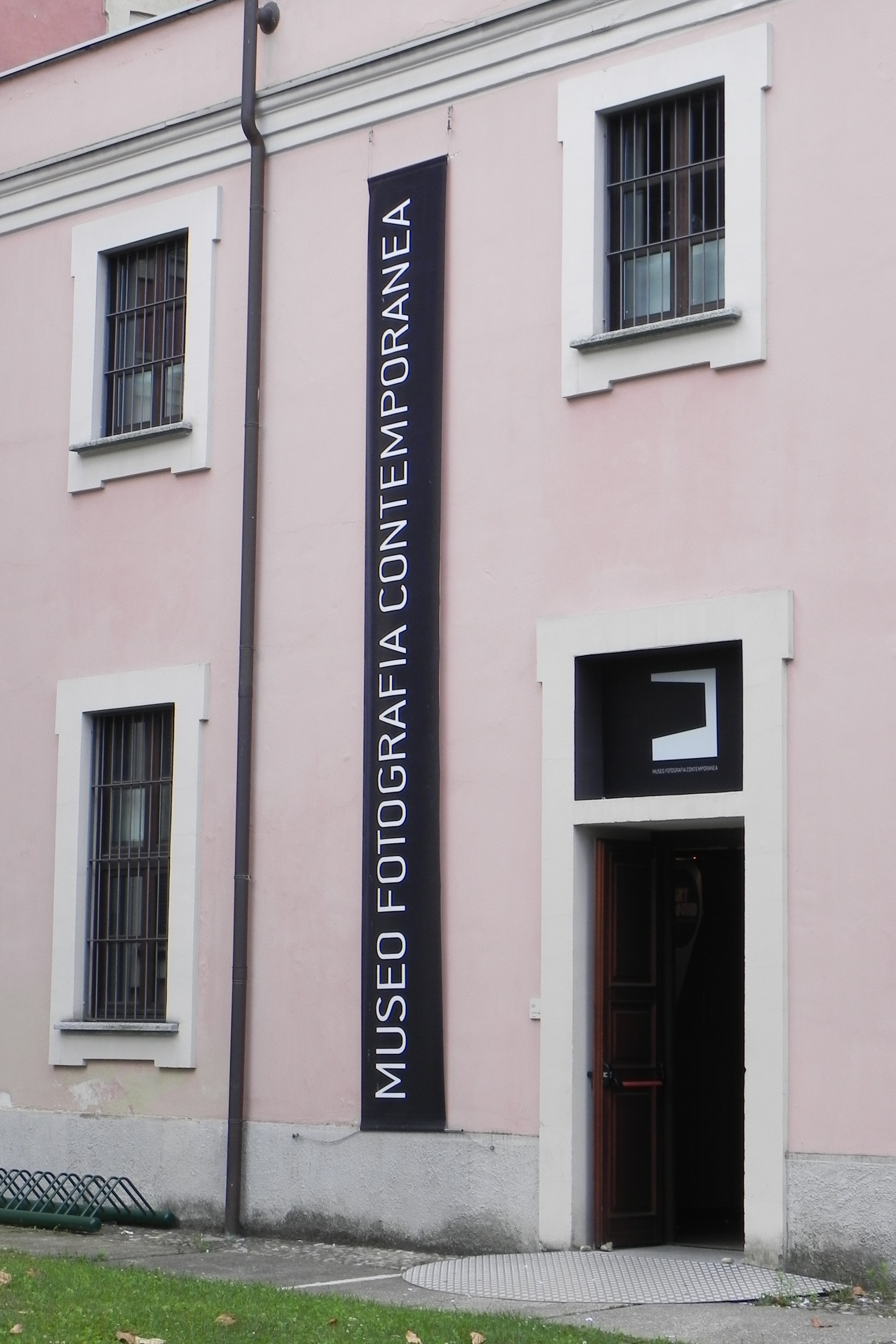 Cinisello Balsamo, Villa Ghirlanda Silva, l'ingresso al Museo della Fotografia Contemporanea, nell'ala sud